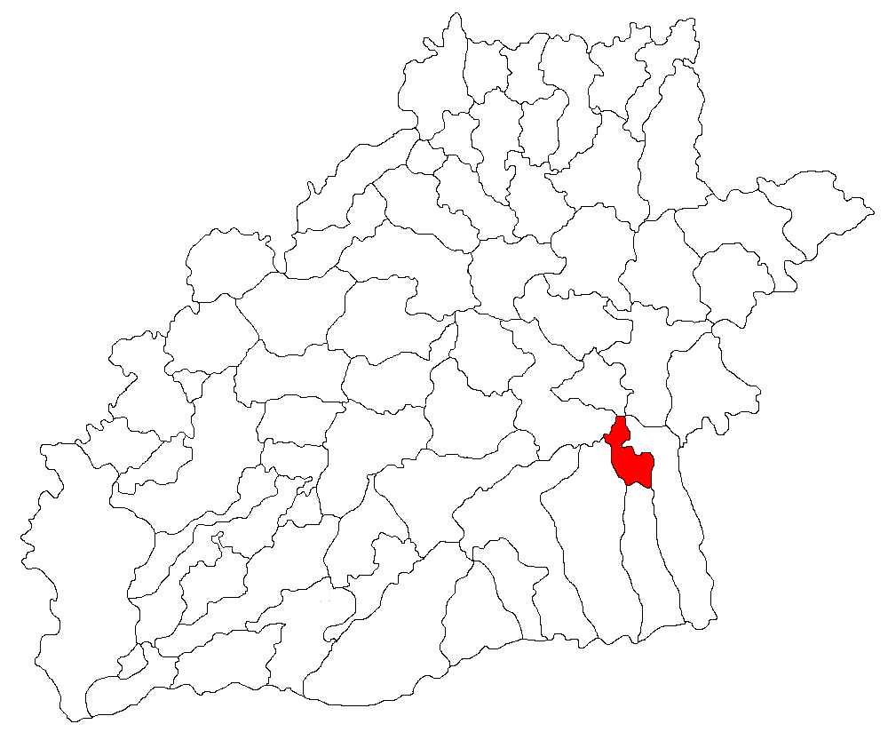 Categorie:Hărţi ale judeţului Sibiu